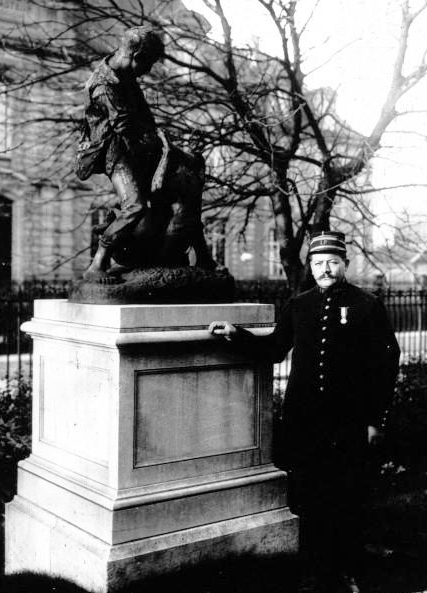 Jean-Baptiste Jupille (1869-1923) gardien de l'Institut Pasteur en 1913.